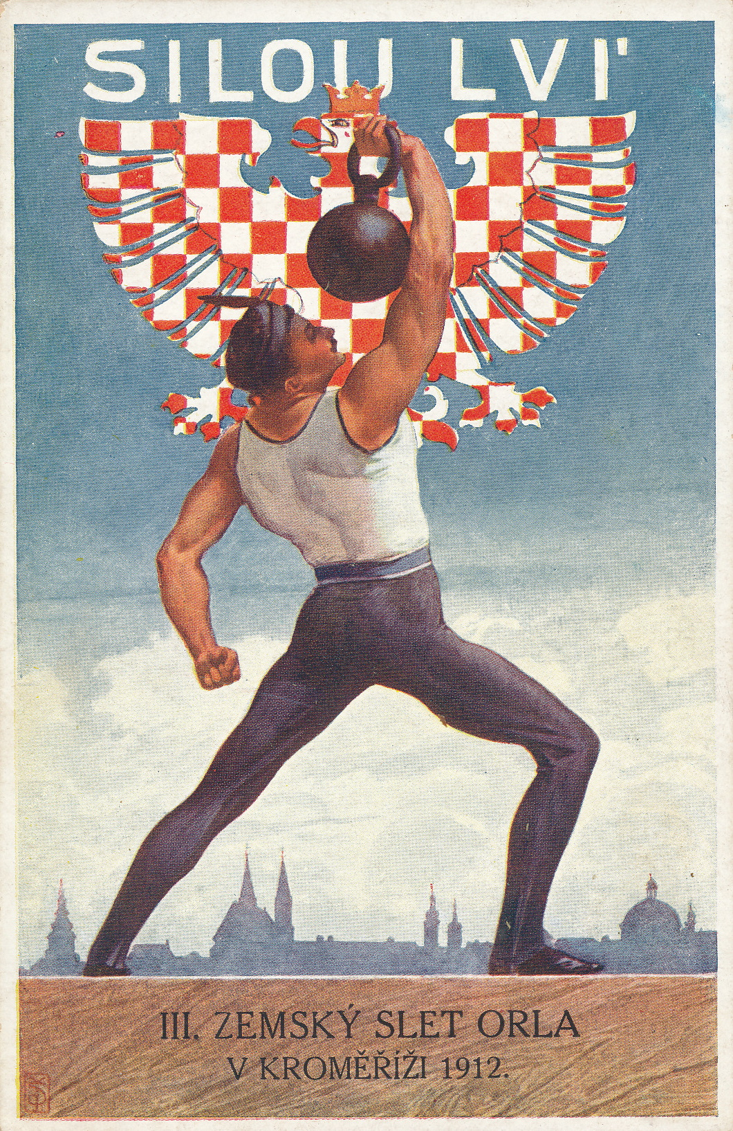 V roce 1912 soustředily všechny moravské odbory Orla svoji pozornost na III. zemský slet Orla, který se konal 11. srpna 1912 v Kroměříži. Bylo na něj vypraveno z celé Moravy 10 zvláštních vlaků. Opat Bařina ze starobrněnského kláštera augustiniánů sloužil pontifikální mši svatou. Ve velkém průvodu v Kroměříži pochodovalo 1800 orlů, 460 orlic a 420 dorostenců. Průvodu se zúčastnila i delegace Katolického Sokola amerického, Slovinského Orla a Charvatského Sokola a delegace orlů z východních Čech. Za přítomnosti 25000 osob v Kroměříži cvičilo 2631 orlů a orlic. Výroba dopisnice: Unie, Praha.